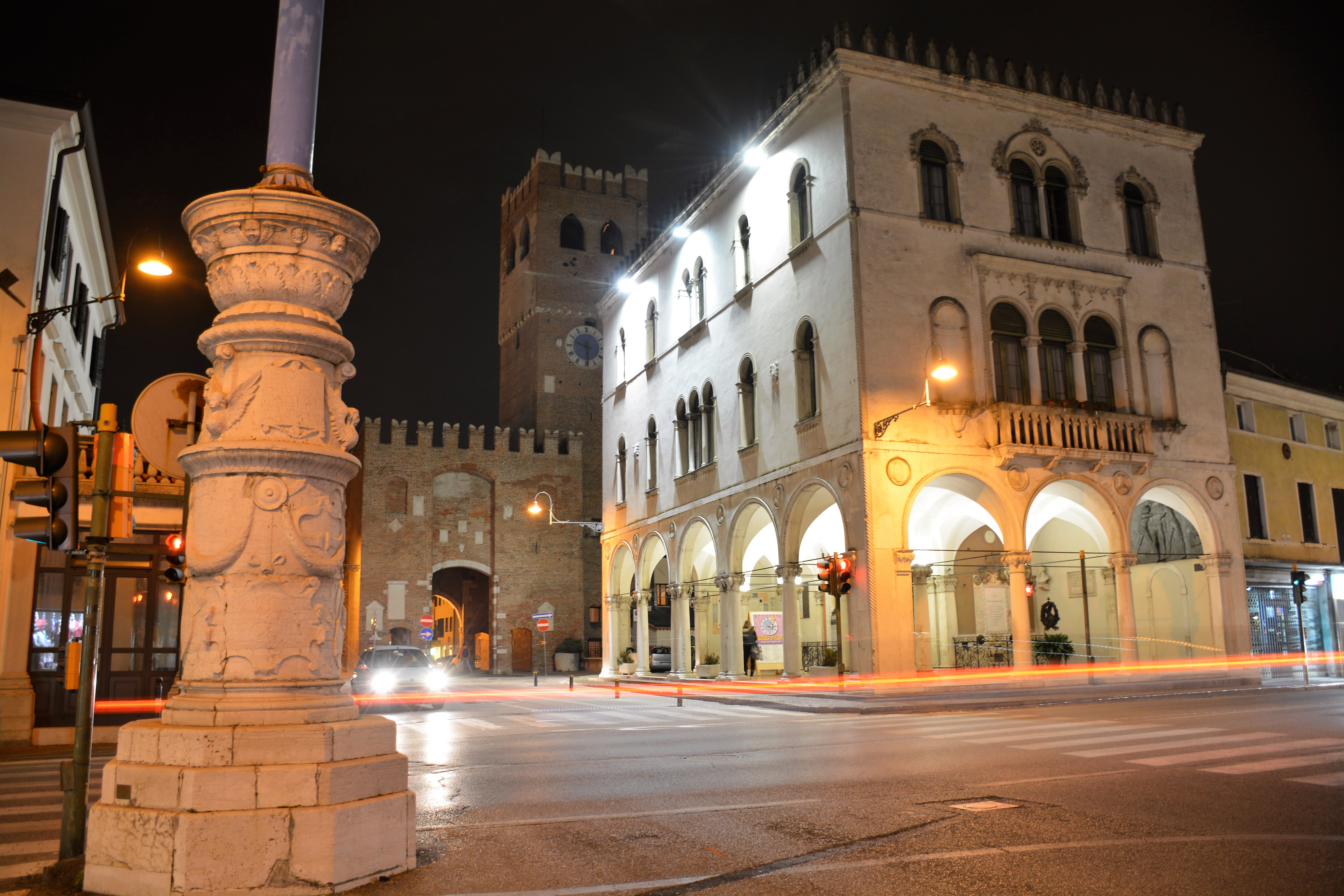 Palazzo della Loggia This is a photo of a monument which is part of cultural heritage of Italy.